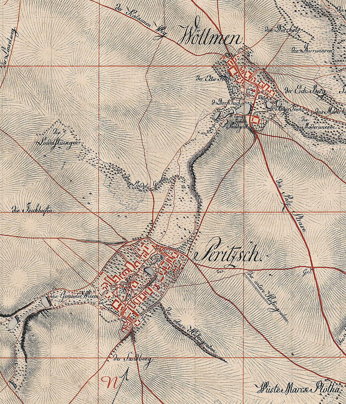 Pehritzsch und Wöllmen auf einer Karte von 1801 (Ausschnitt aus Meilenblätter von Sachsen 1780-1806)